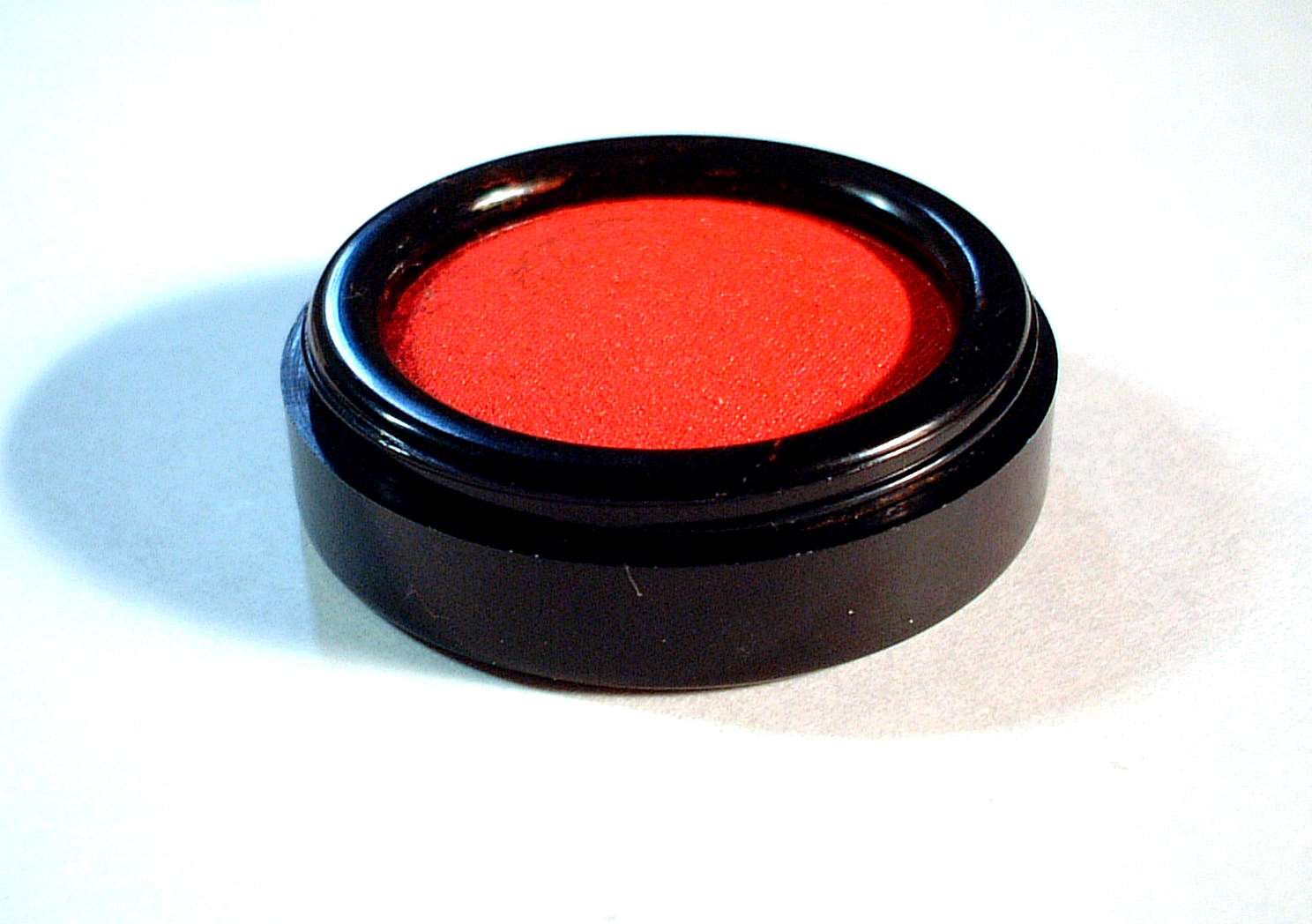 Syuniku, Ink for seal. Photo taken in Japan .